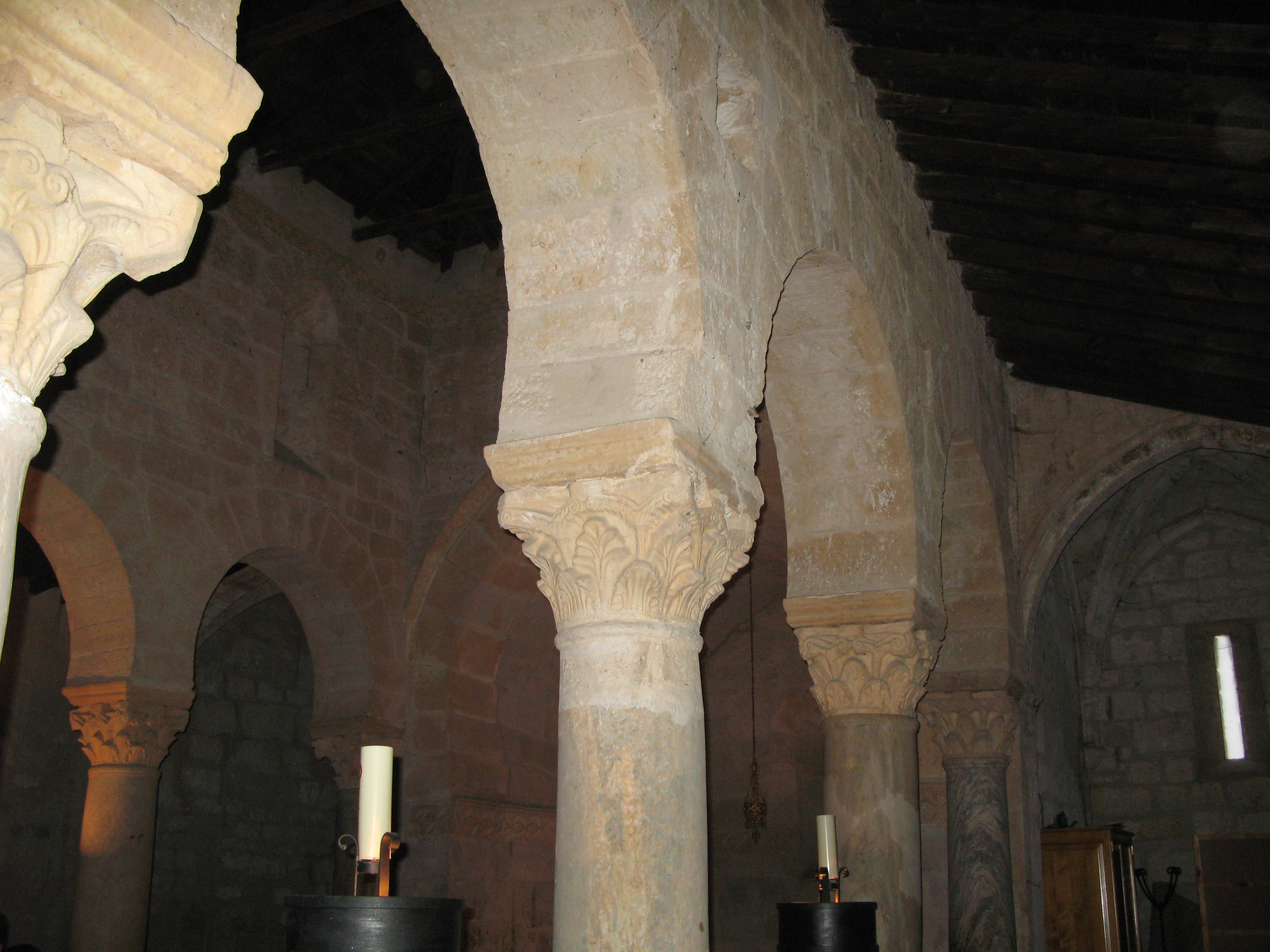 INTERIOR DE SAN JUAN DE BAÑOS EN LA LOCALIDAD DE BAÑOS DE CERRATO, MUNICIPIO DE VENTA DE BAÑOS, PROVINICA DE PALENCIA, COMUNIDAD DE CASTILLA Y LEÓN, ESPAÑA